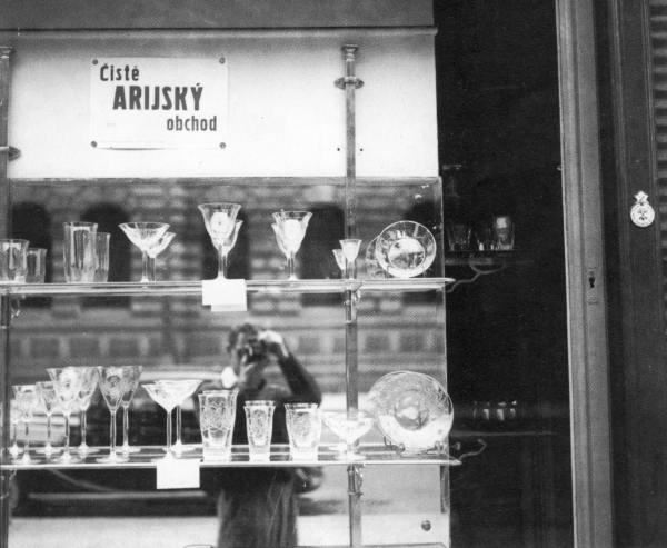 Protižidovské tažení nacistické okupační správy začalo okamžitě po okupaci